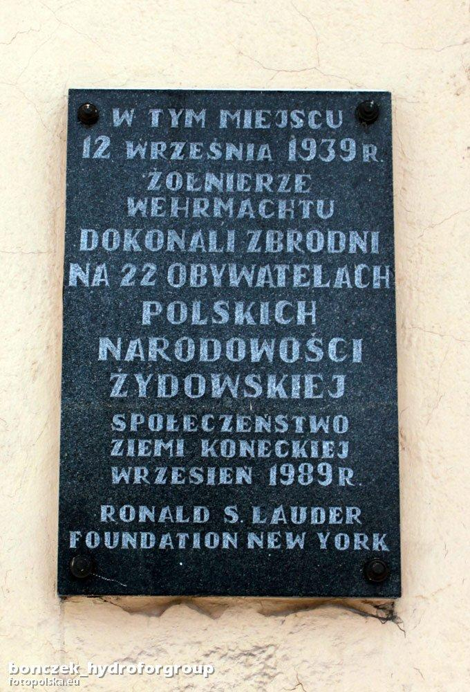 Tablica pamiątkowa na ścianie frontowej kamienicy, pod którą dokonano egzekucji